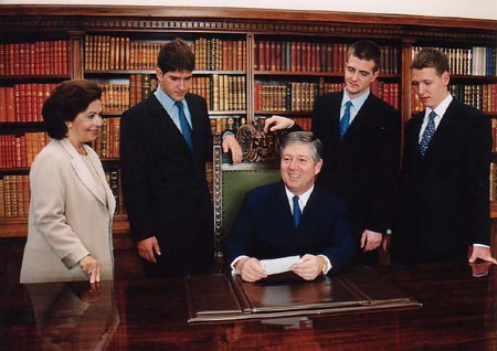 породица престолонаследника Александра Карађорђевића Извор: званични сајт Дозвола: Википедија:Дозволе за објављивање/Краљевска породица Карађорђевић